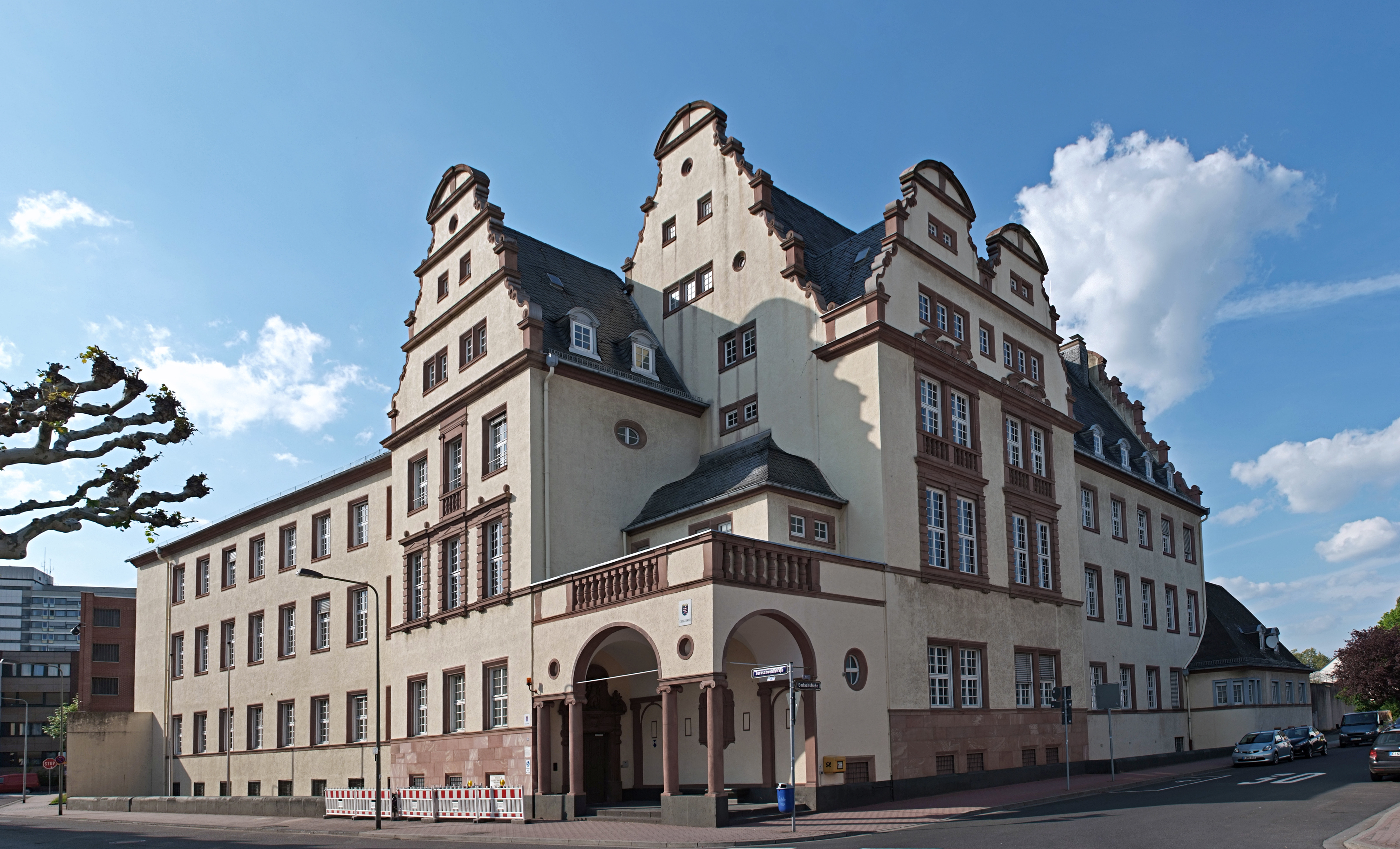 Amtgericht Frankfurt-Höchst